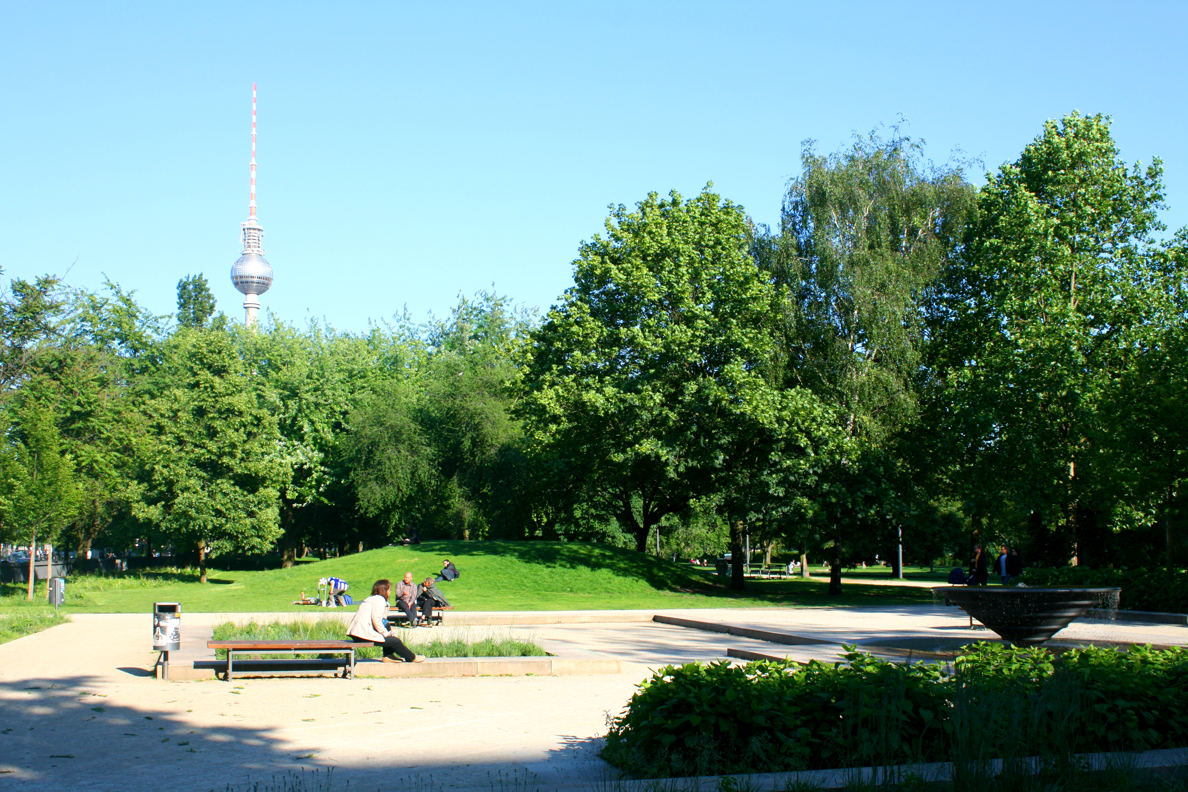 Blick in den Monbijoupark in Berlin-Mitte (Oranienburger Straße Ecke Monbijoustraße), rechts unten im Bild ist der Schalenbrunnen, links im Hintergrund der Berliner Fernsehturm